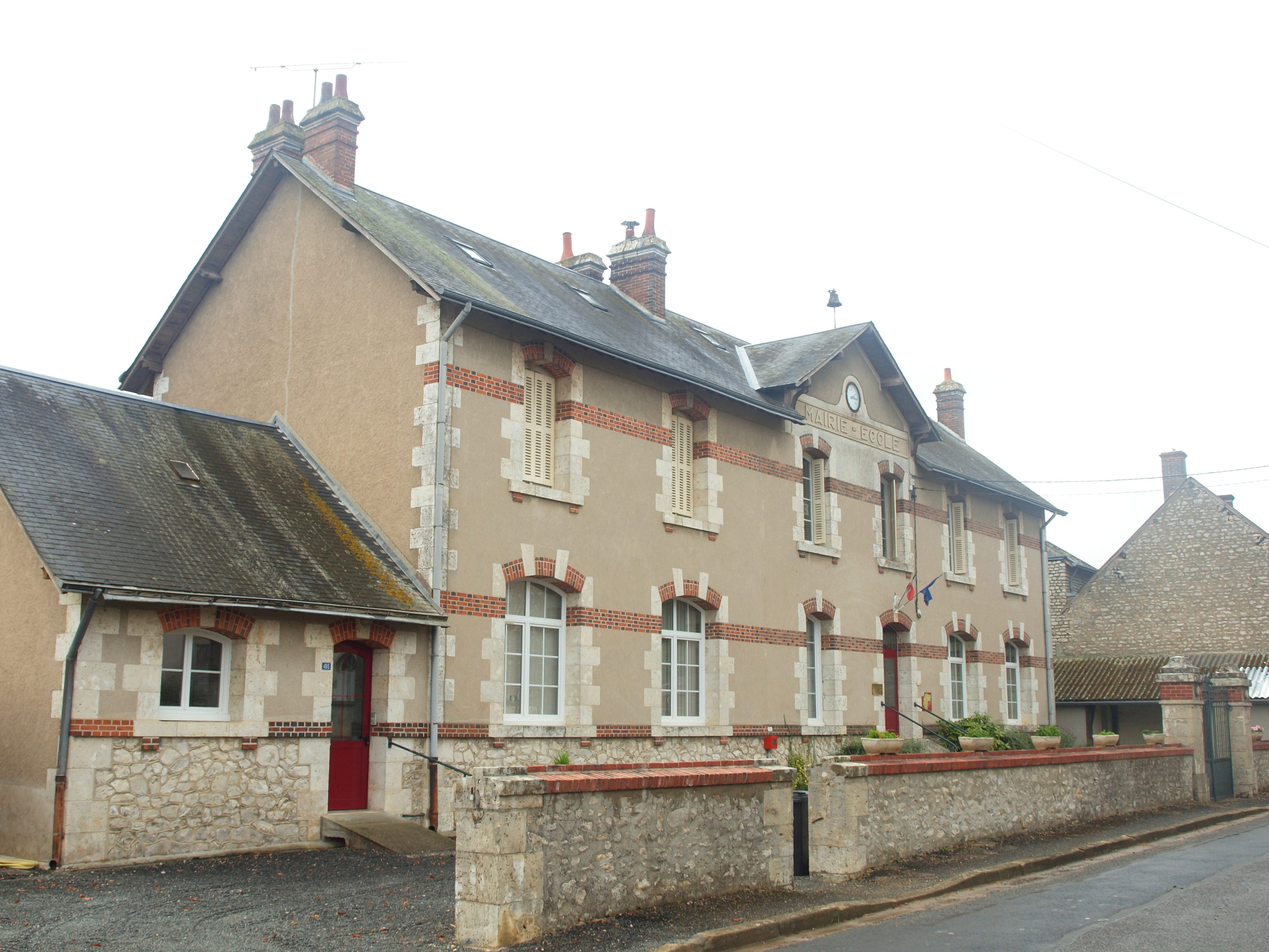 Ouzouer-le-Doyen (Loir-et-Cher, France)